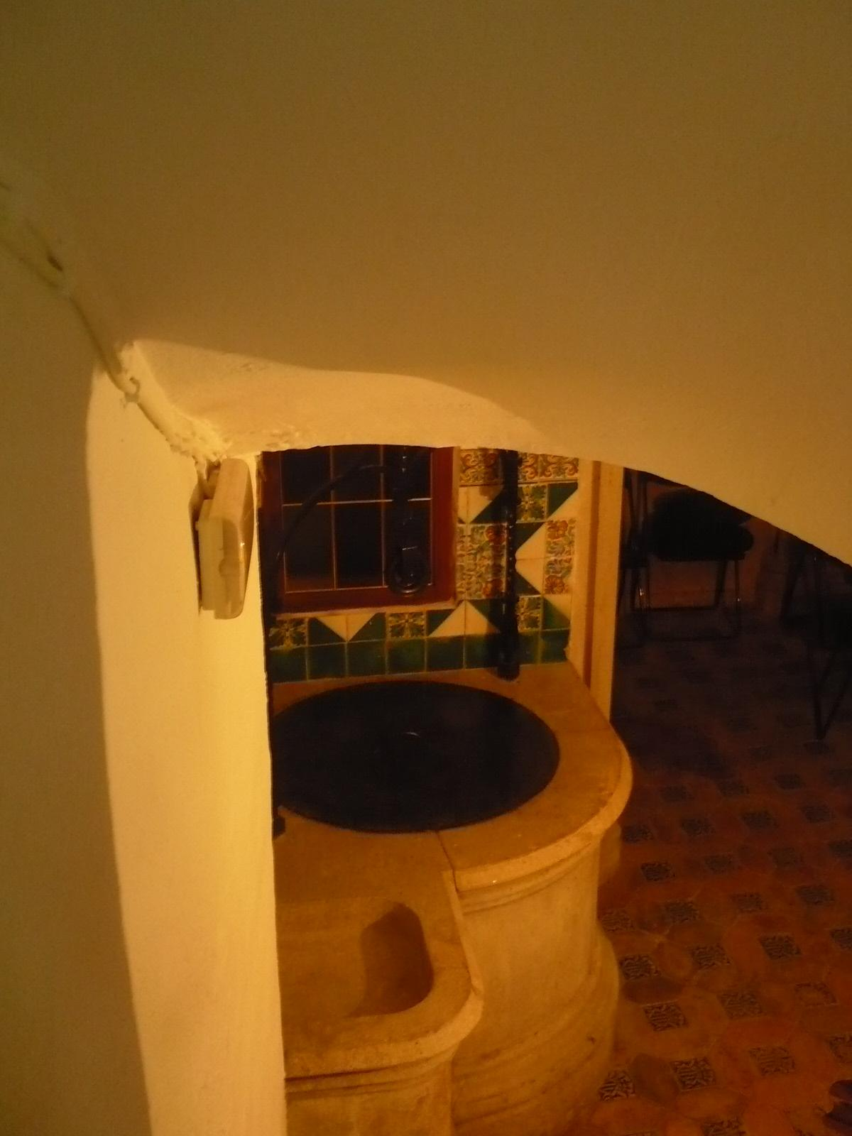 Pozo (pouet) donde la tradición cuenta que el santo realizó el milagro en una epidemia de cólera.